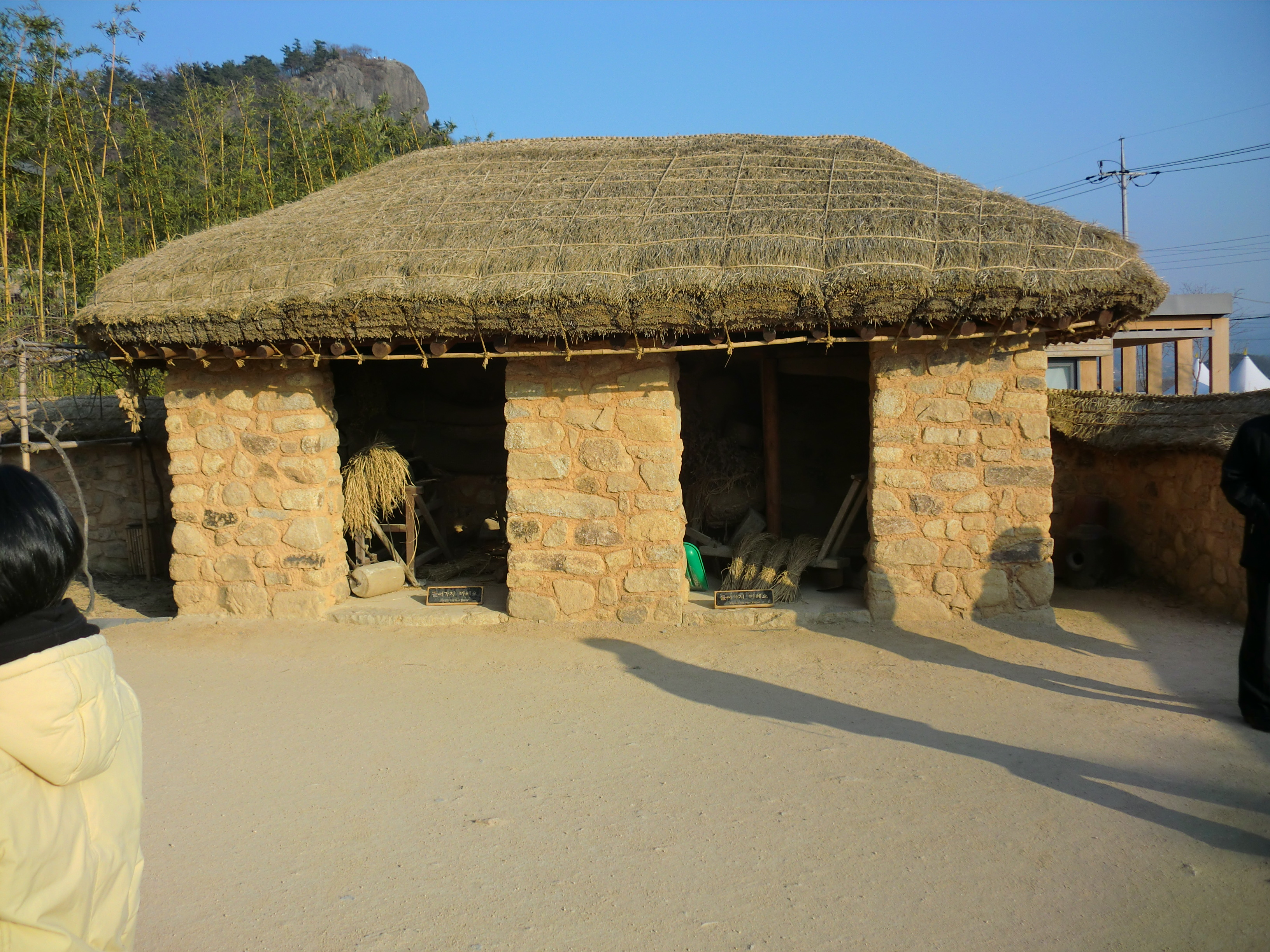 노무현 대통령 생가(복원)